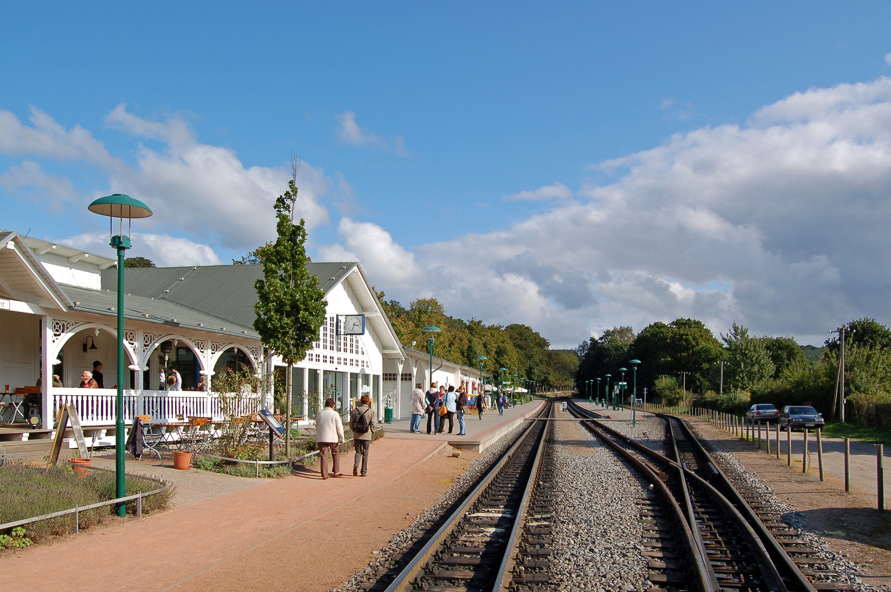 Der neugestaltete Kleinbahn-Bahnhof Binz (Rügen) lo(c)kt wieder die Touristen. Von hier aus geht's im Stundentakt Richtung Göhren, Putbus oder Lauterbach.